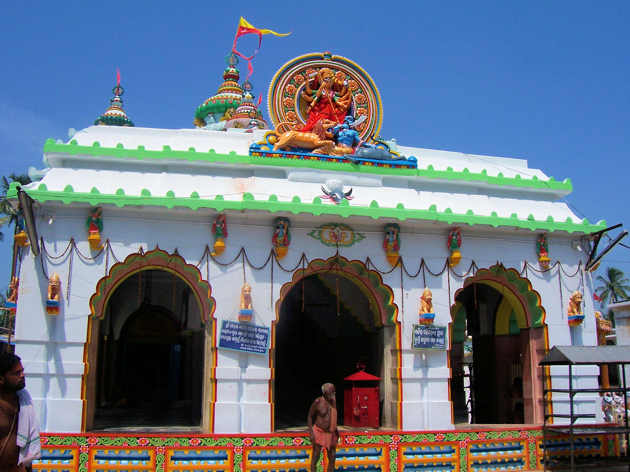 Sarala Temple in Jagatsinghpur, Orissa